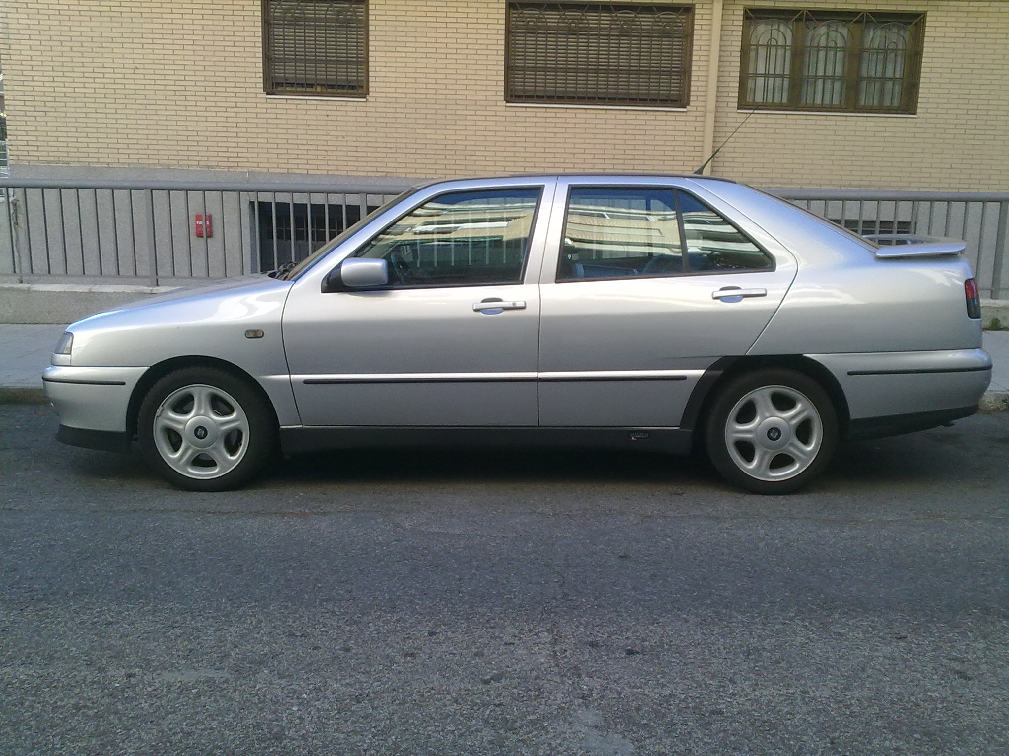 Seat Toledo 1l (Realizada con el movil)